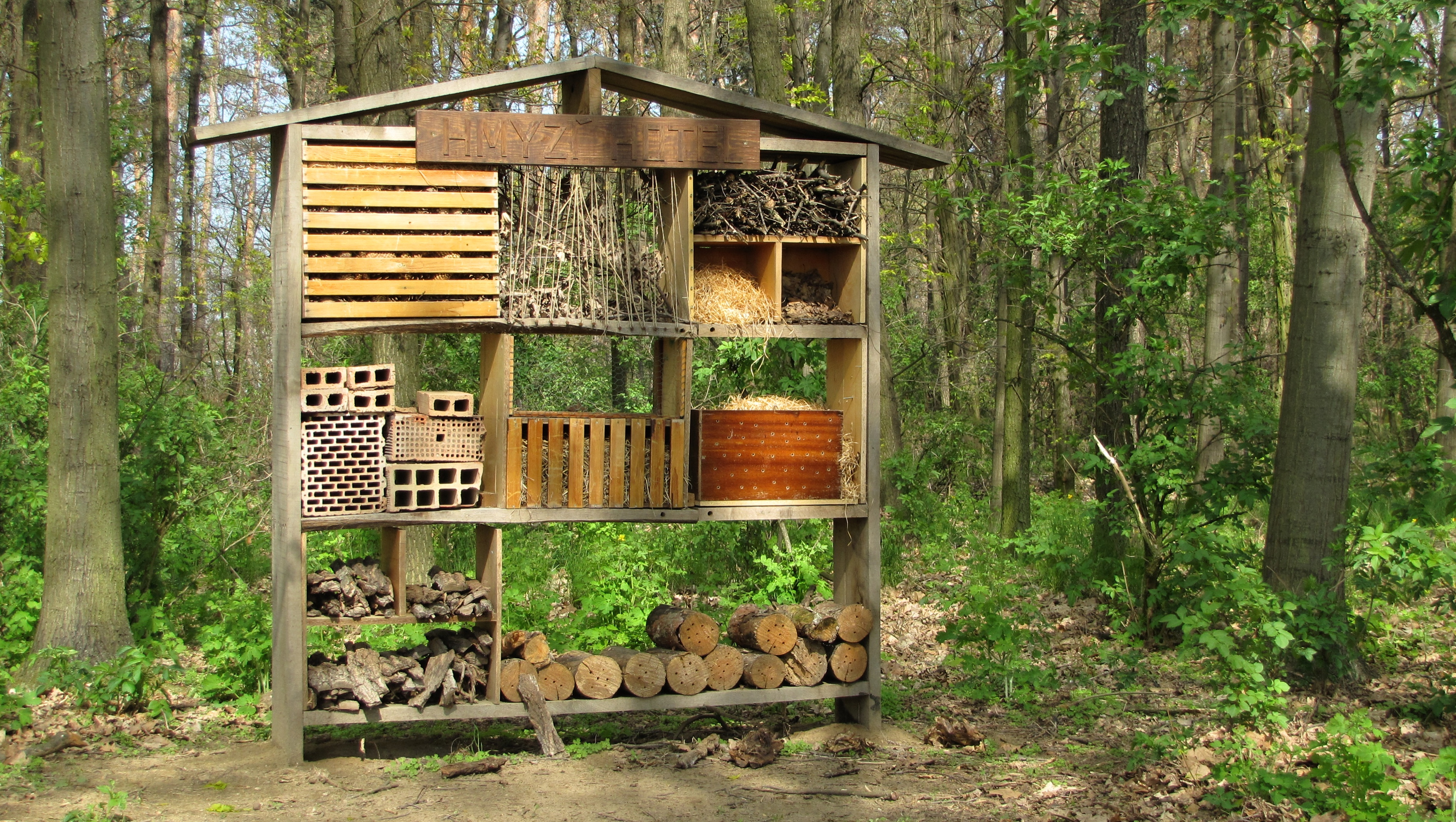 Hmyzí hotel u cyklostezky ve Svatobořicích-Mistříně